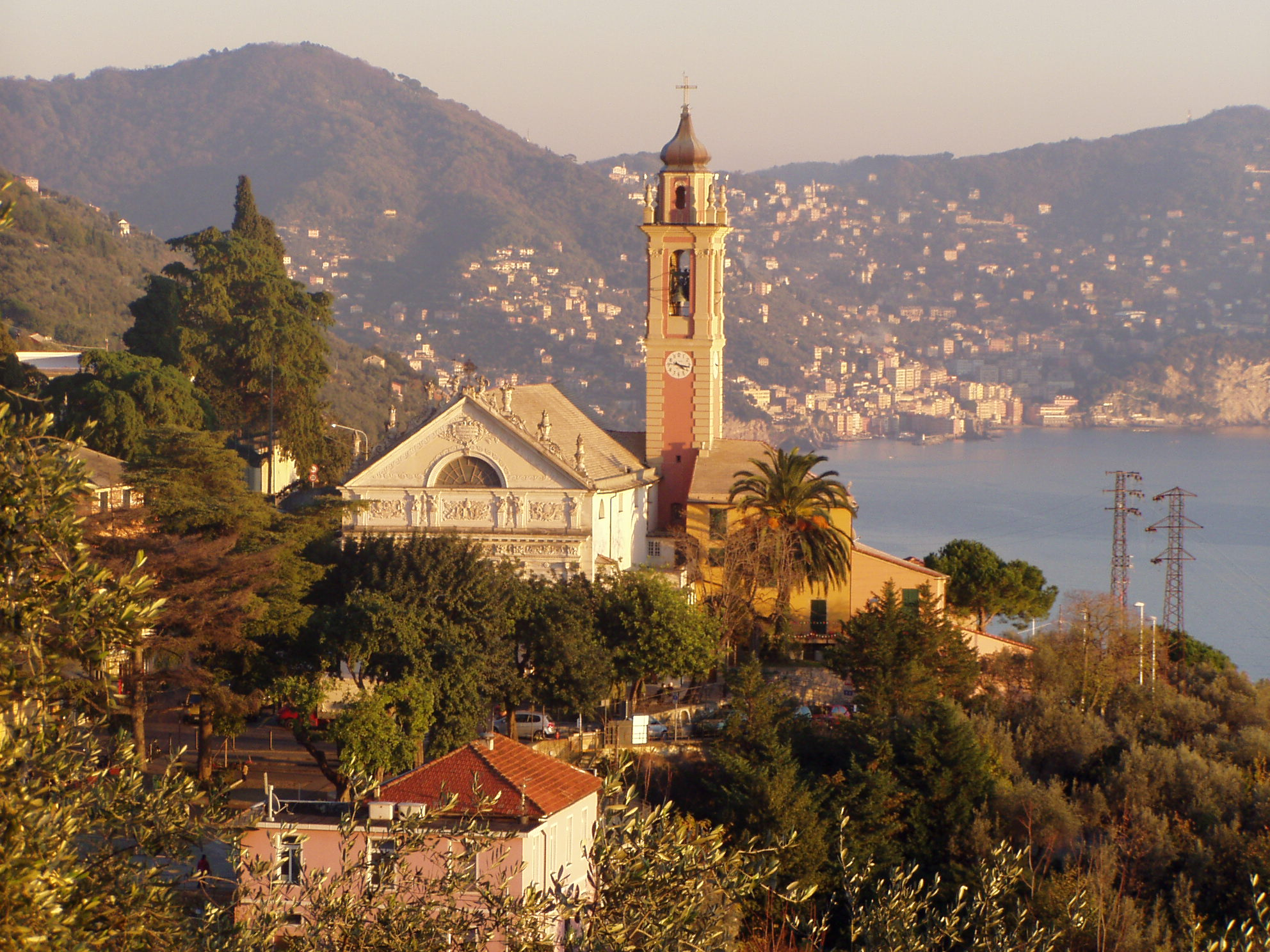 Veduta della chiesa di Pieve Ligure